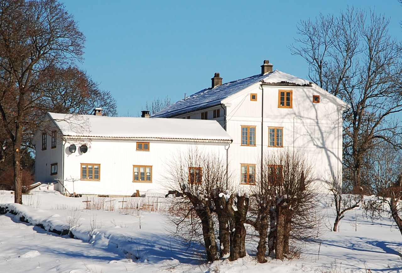 Abildsø gård sett fra sydvest